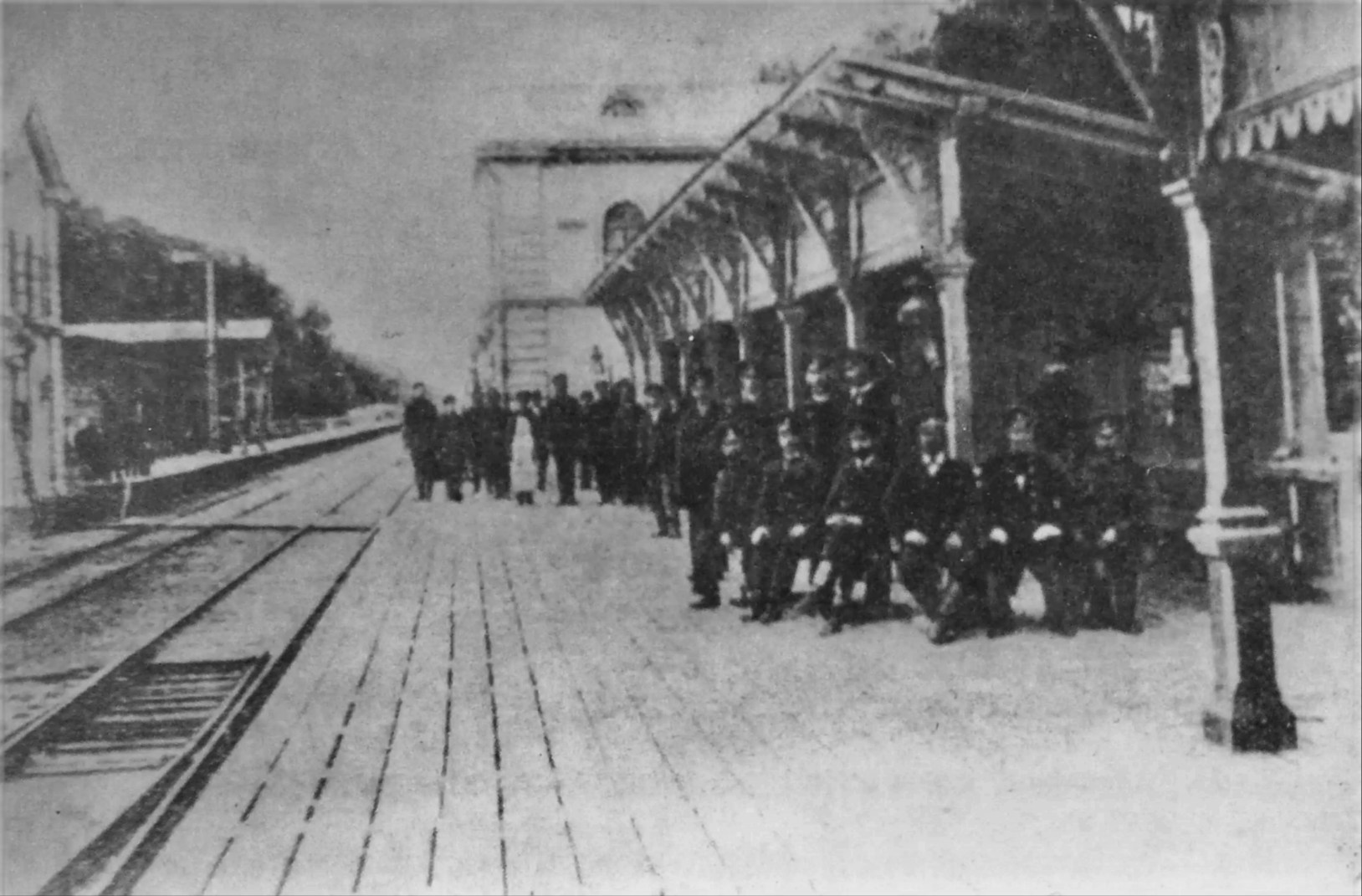 Вокзал станции Химки (ок. 1900)